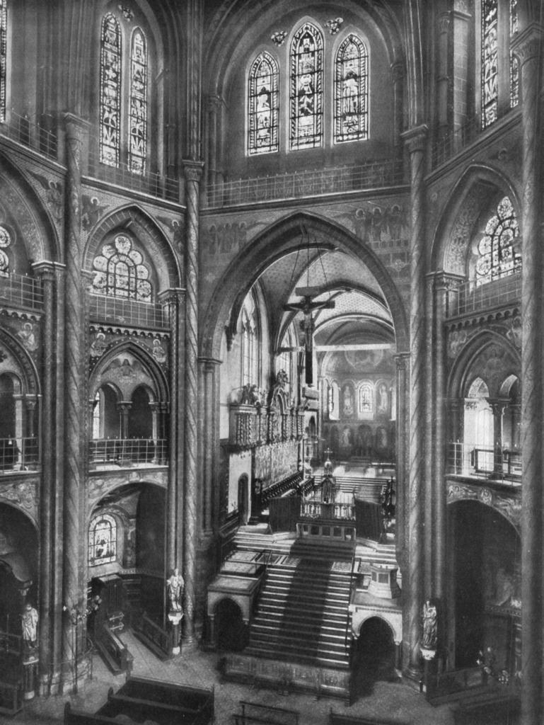 St. Gereon Innenansicht um 1925